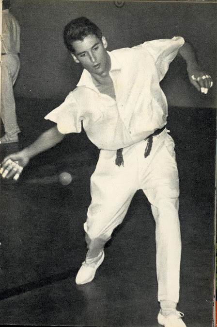 Arriola IV